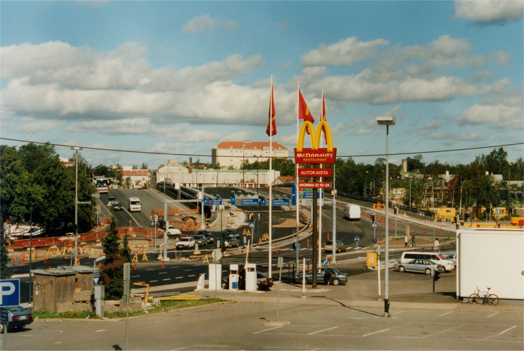 Vasemmalla vanha ja oikealla uusi Aninkaistensilta Turussa 27. elokuuta 2000.